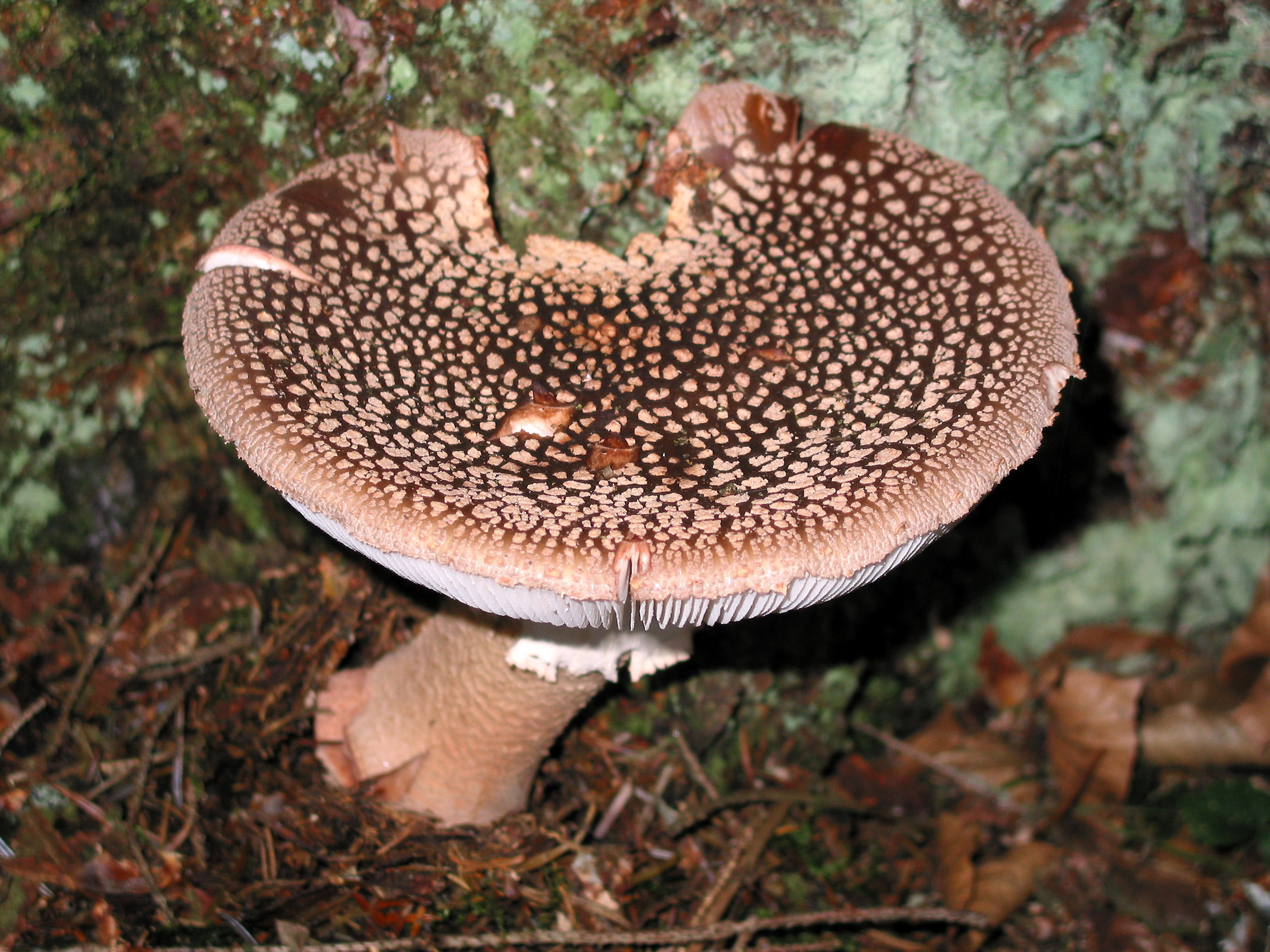 Amanita rubescens (Belgique/Belgium), Anloy (Belgique), bois de conifères (épicéas)/Pine trees wood (spruces).